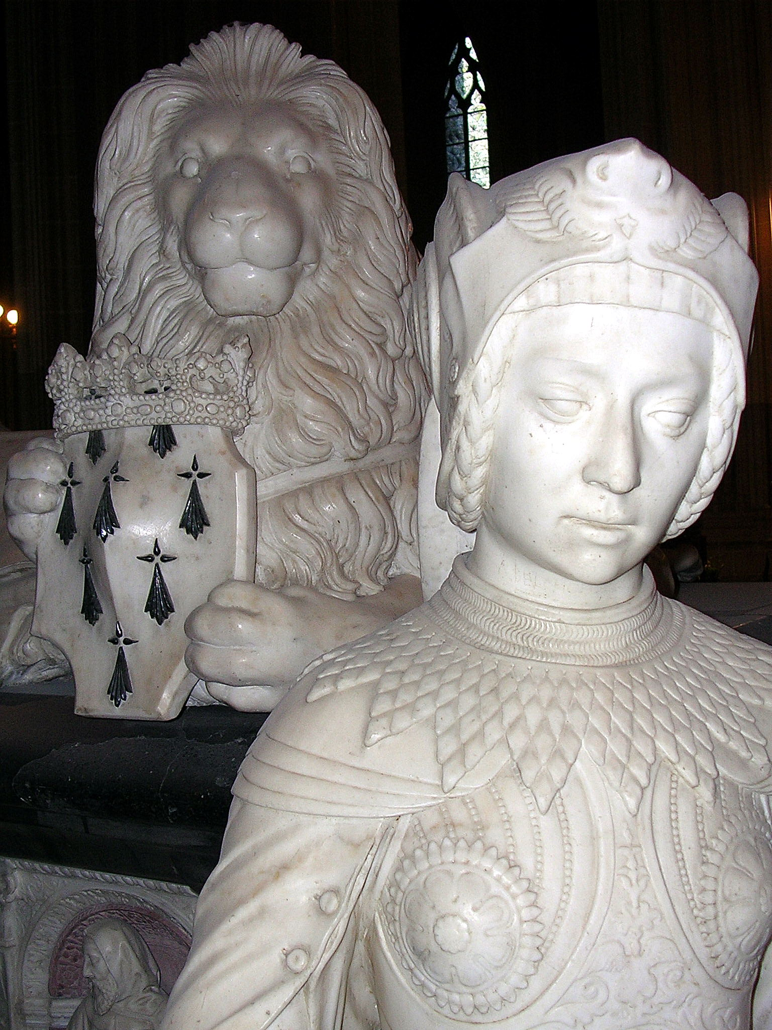 Gisant de François II, cathédrale de Nantes (France). Photo prise par Jibi44